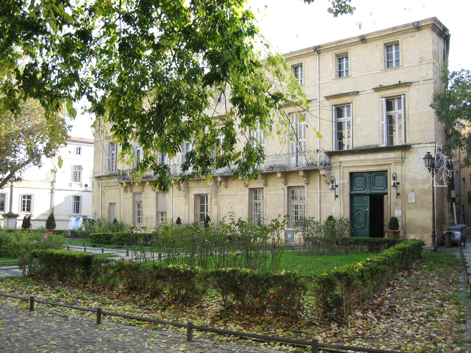 Hôtel de Belleval, place de la Canourgue à Montpellier (France). Ancien Hôtel de ville (1816-1975). Conseil des Prud'hommes de Montpellier